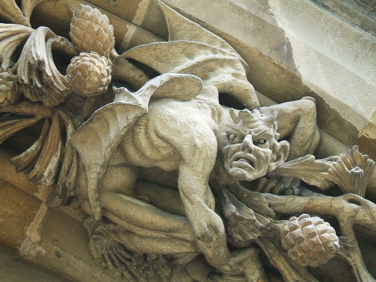 Relieve exterior en la Catedral Nueva de Vitoria-Gasteiz